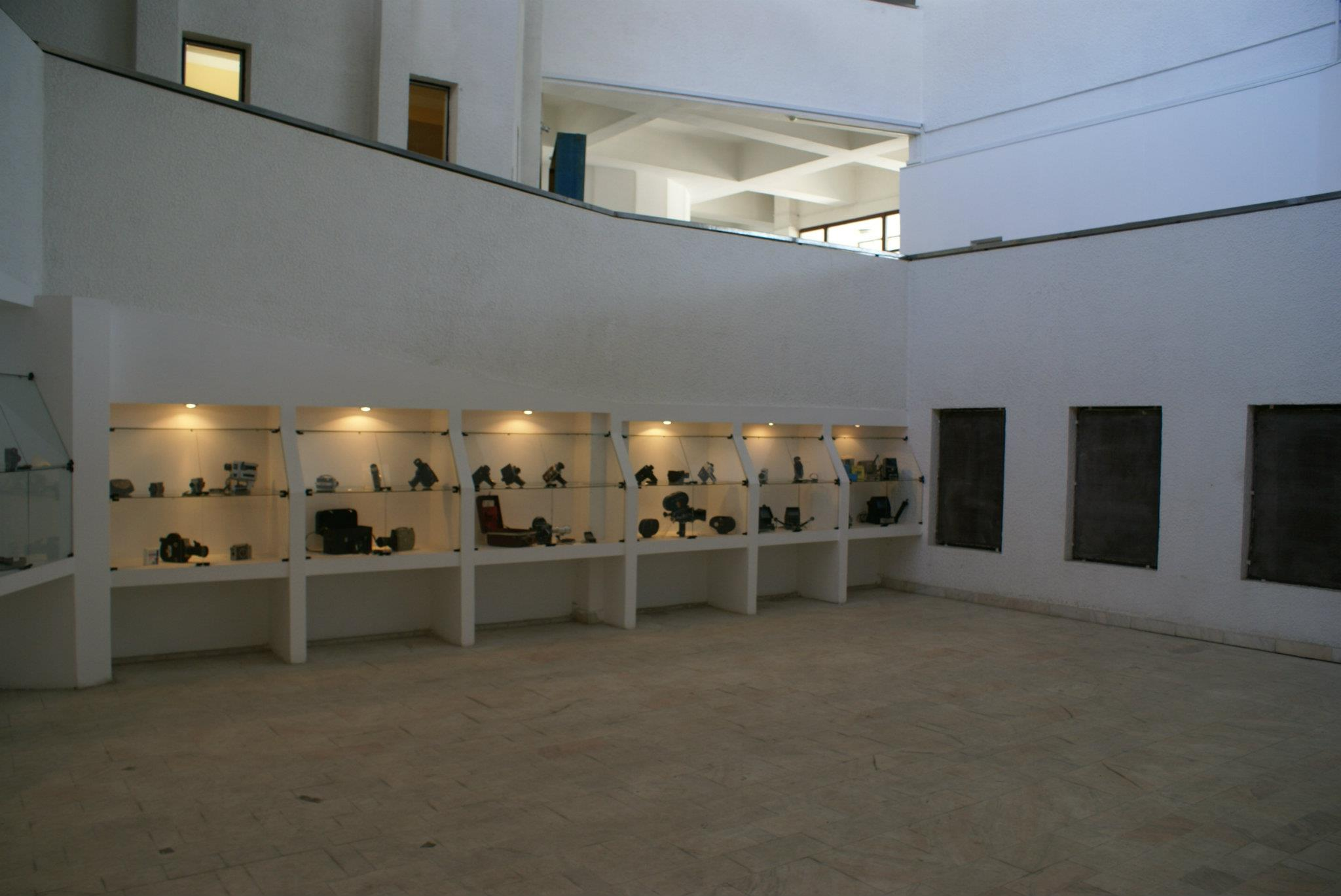 Expoziție temporară a Muzeului Cineastului Amator, organizată în 2012 cu ocazia evenimentului Noaptea Muzeelor